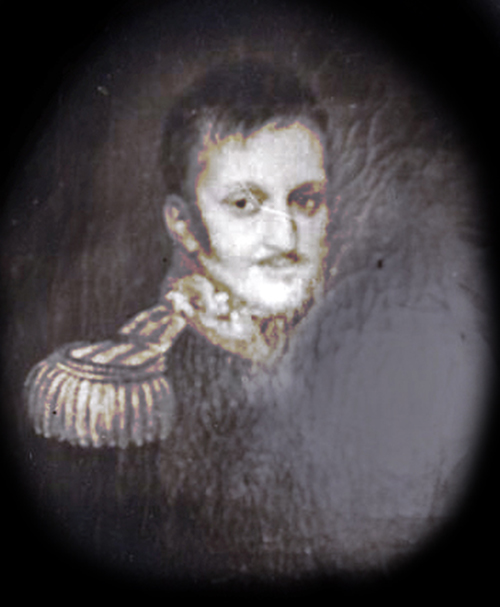 Portret van P.A. VON DAEHNE (1780-1859)